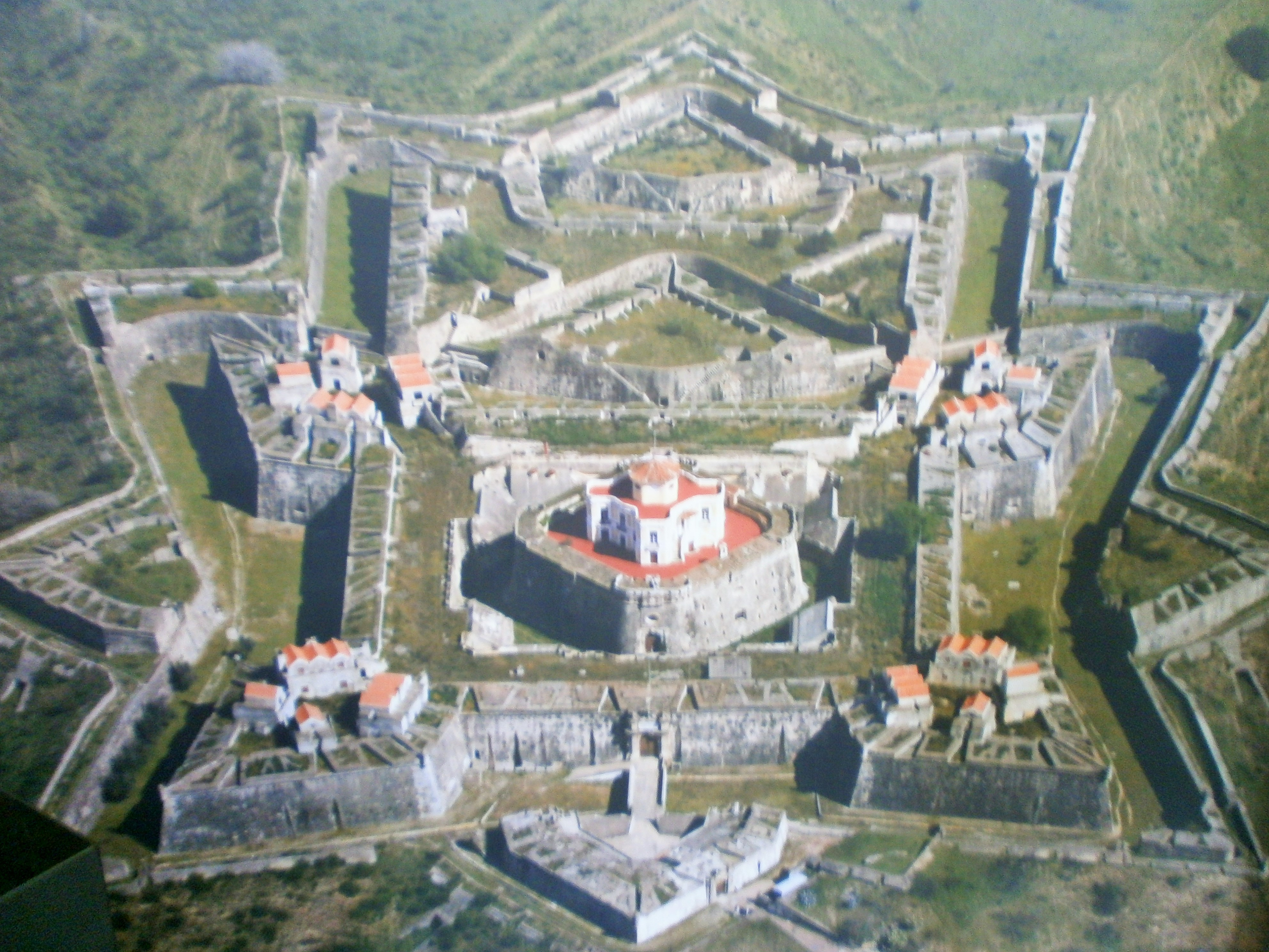 Fortaleza de Elvas.Vista aérea.